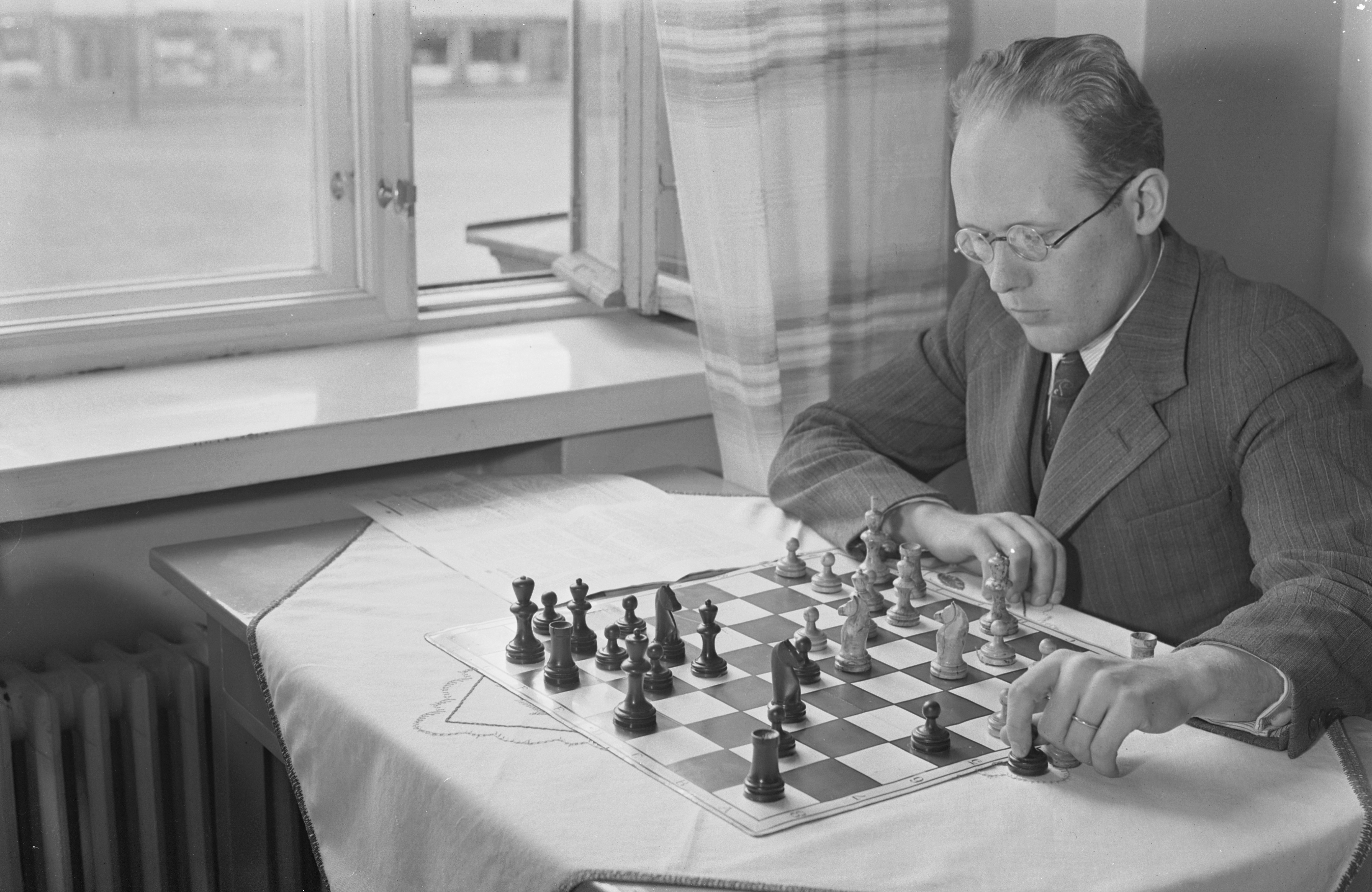 Shakkimestari Eero Böök shakkitehtävää ratkaisemassa. Helsinki.